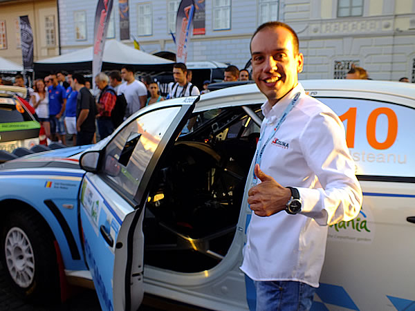 Valentin Porcisteanu - Vicecampion National de Raliuri al Romaniei 2012